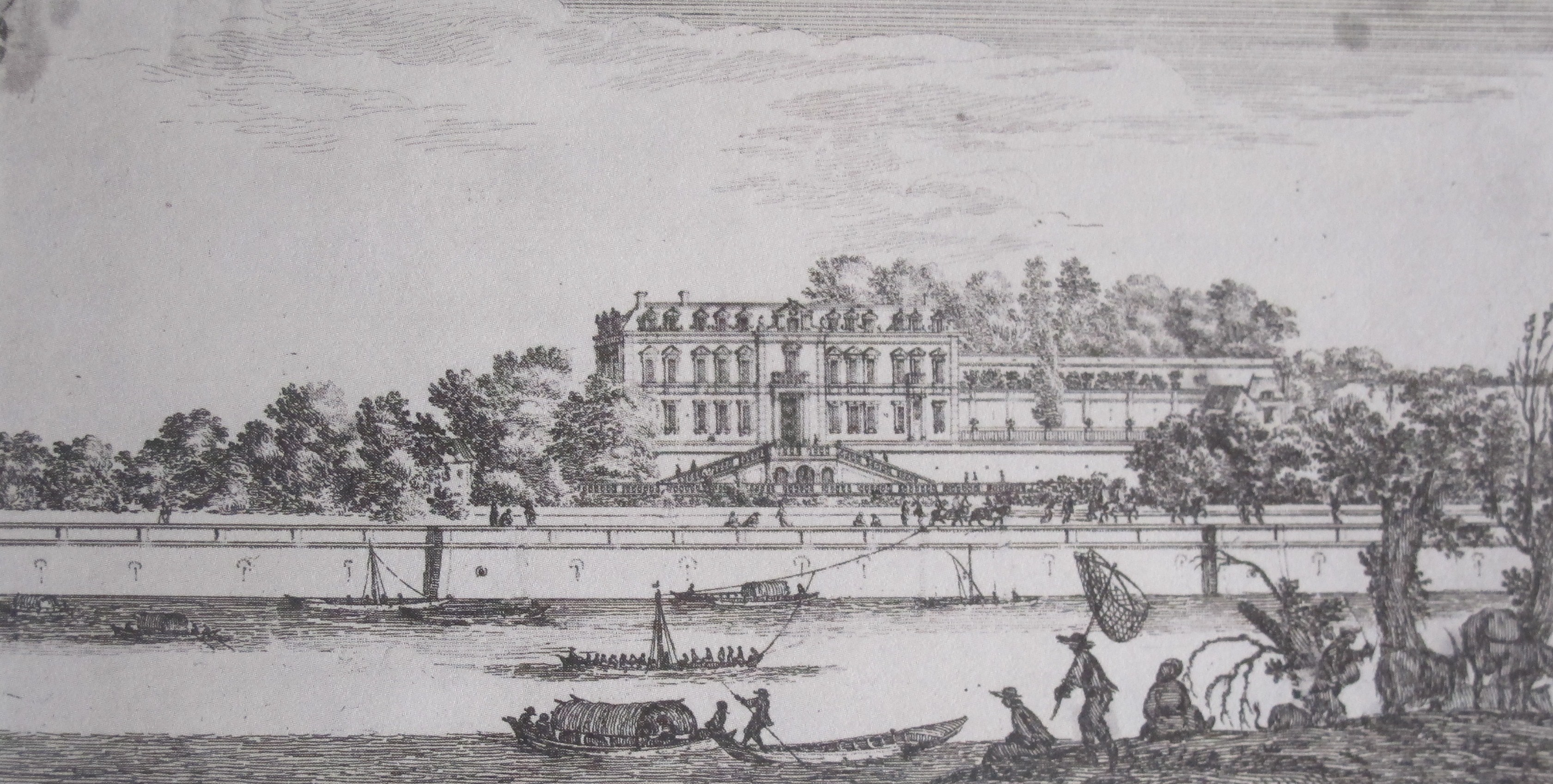 Vue du château de Chaillot, demeure construite par Catherine de Médicis à la fin du XVIe siècle. Gravure d'Israël Silvestre réalisée au XVIIe siècle.